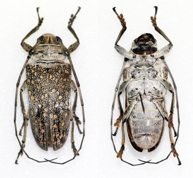 Dillon & Dillon,1946 Sex: Female Data: 03-2011 - Tingo Maria - Peru Size: ?